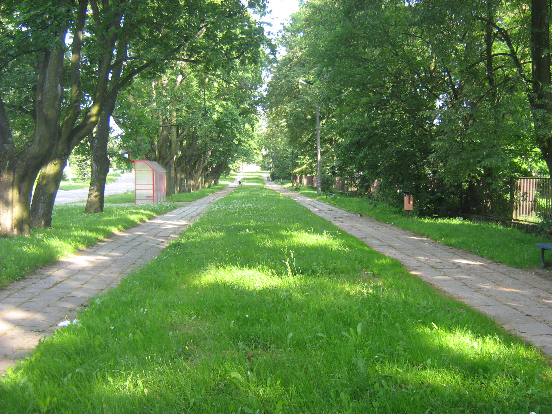 Alejka przy ul. Kryńskiej na Osiedlu Zielonym w Sokółce.